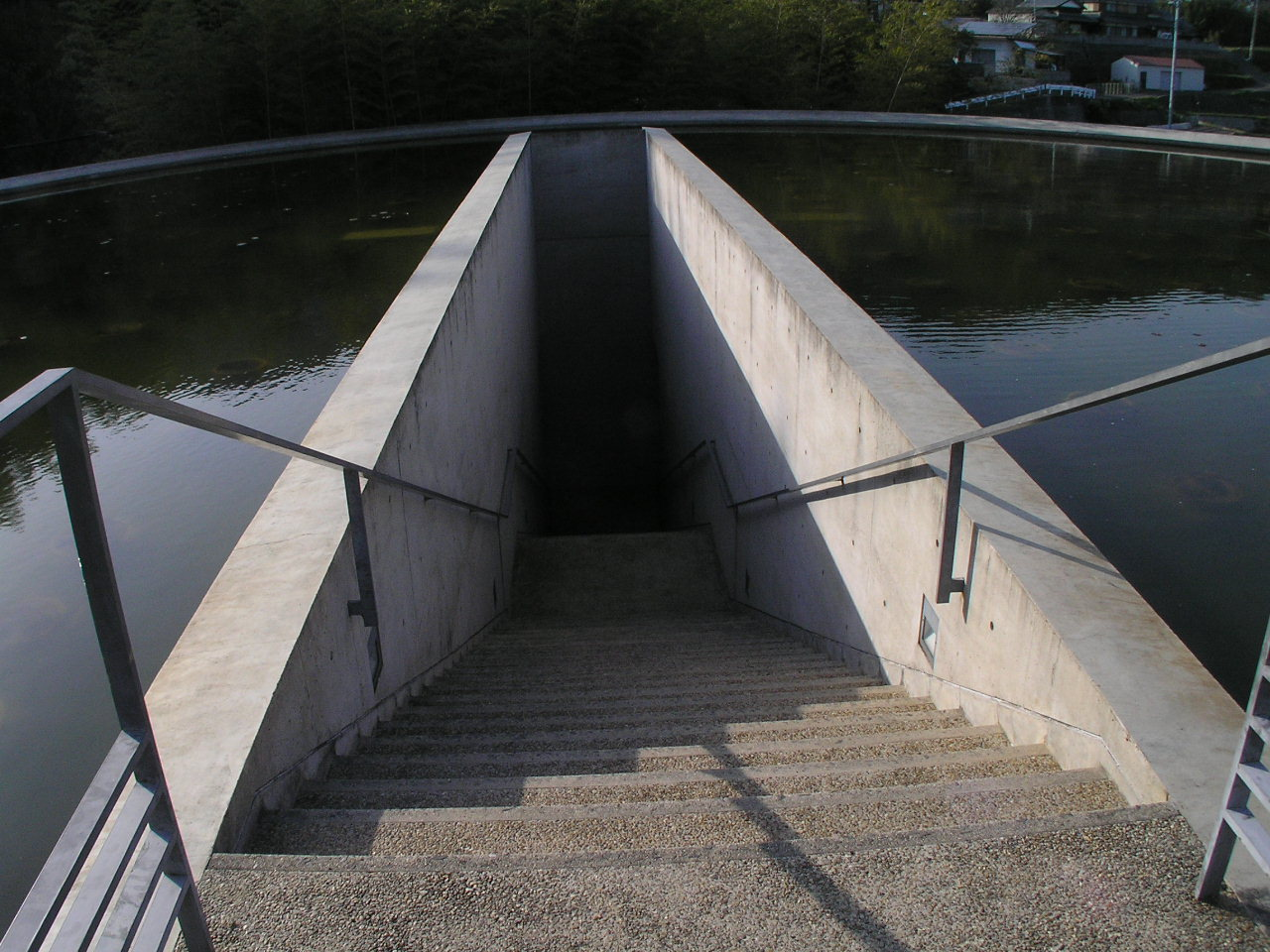 本福寺水御堂（ほんぷくじみずみどう） 本福寺は、平安時代後期に創建された真言密教の寺院で真言宗別格本山。水御堂はその本堂で1991年竣工の安藤忠雄設計による鉄筋コンクリート造の寺院建築。第34回建築業協会賞を受賞。 ～photo by Autumn Snake 【おぉたむ すねィく探検隊】写真部門 担当 大原佳苗